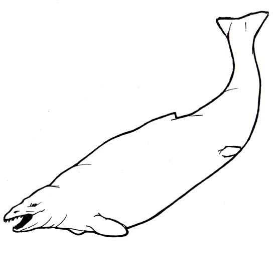 Basilosaurus illustration.